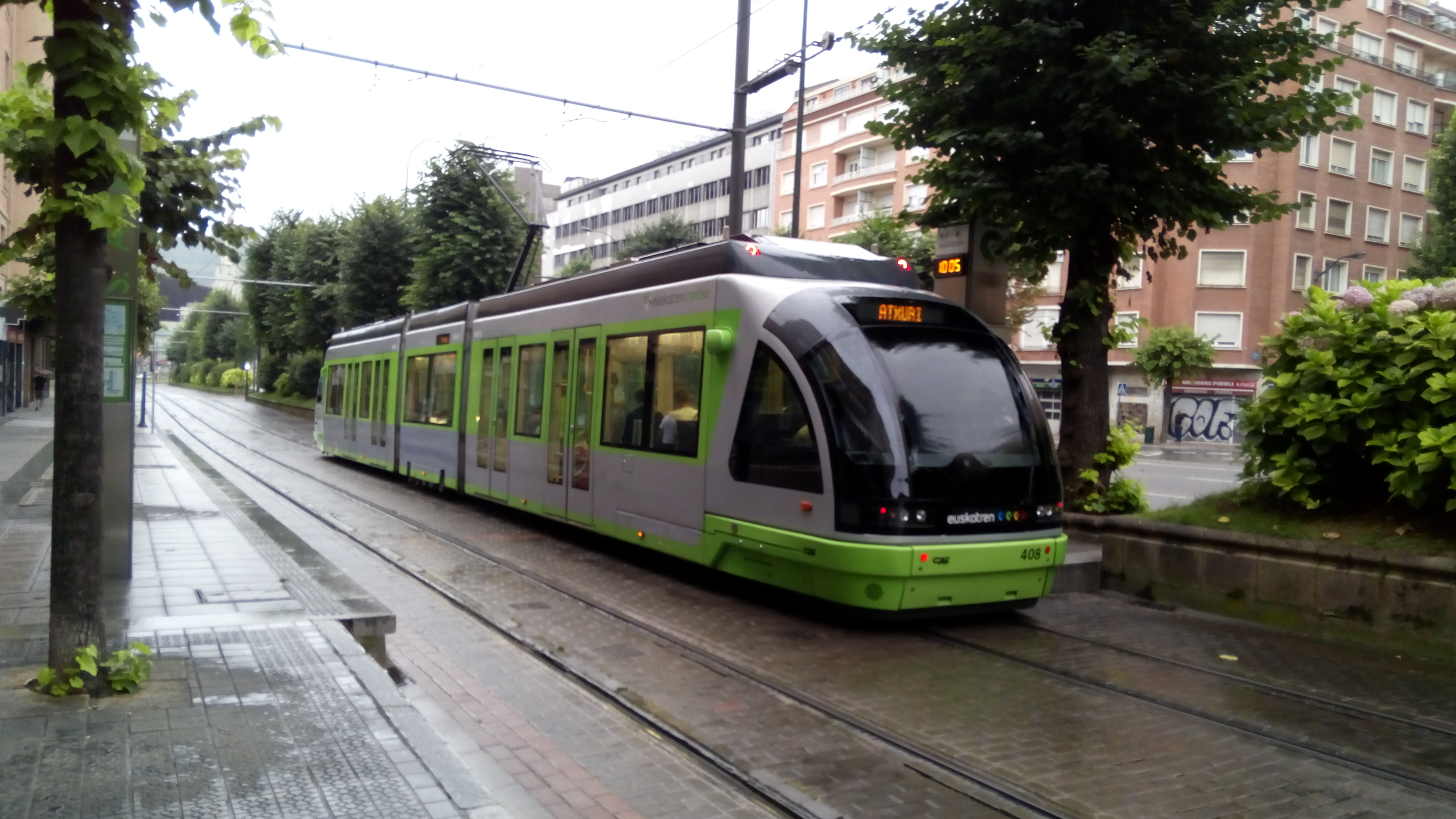 Bilboko tranbia Sabino Aranan